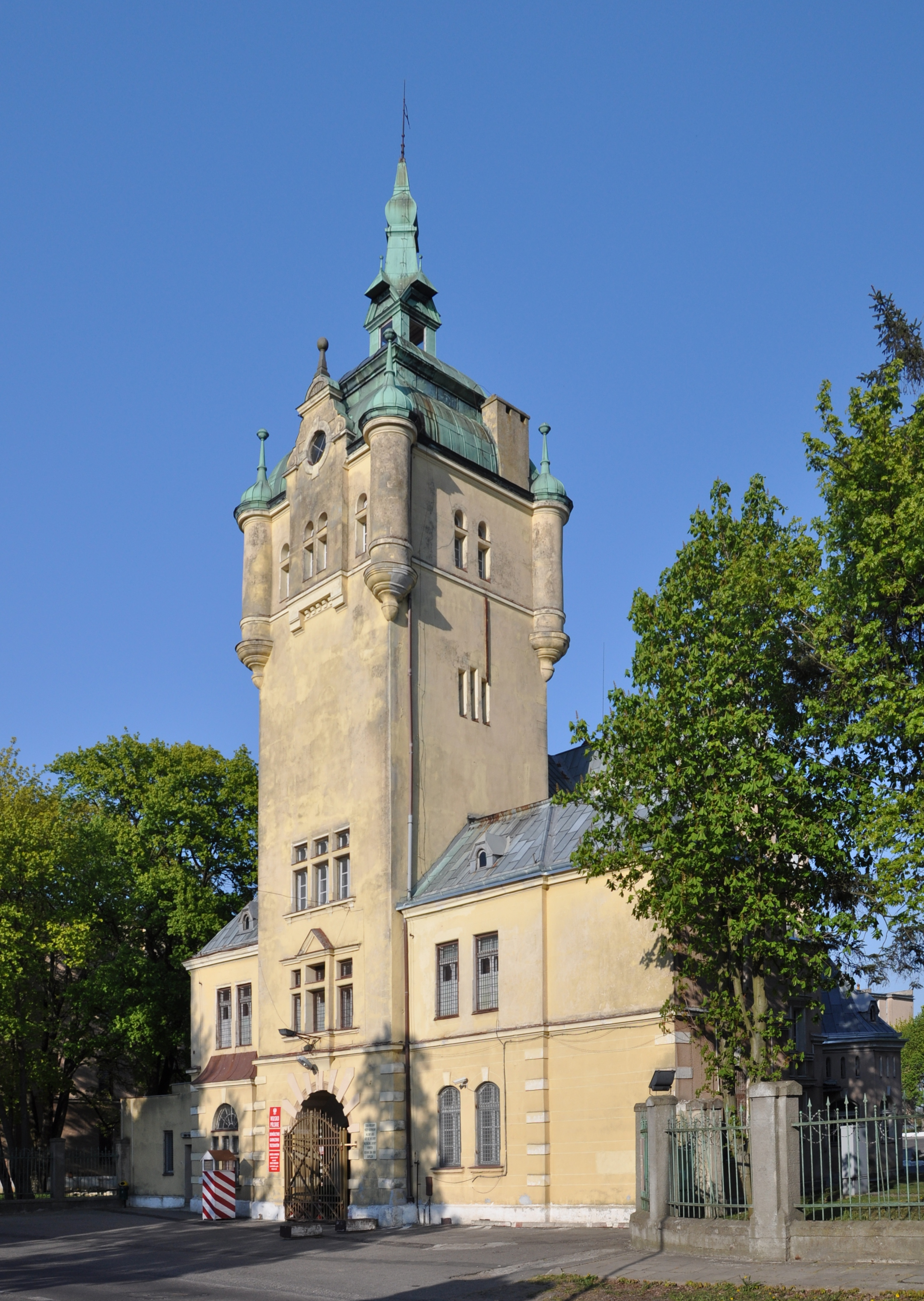 Ehemalige Königliche Unteroffizierschule Hauptportal in Trzebiatów (Treptow an der Rega)